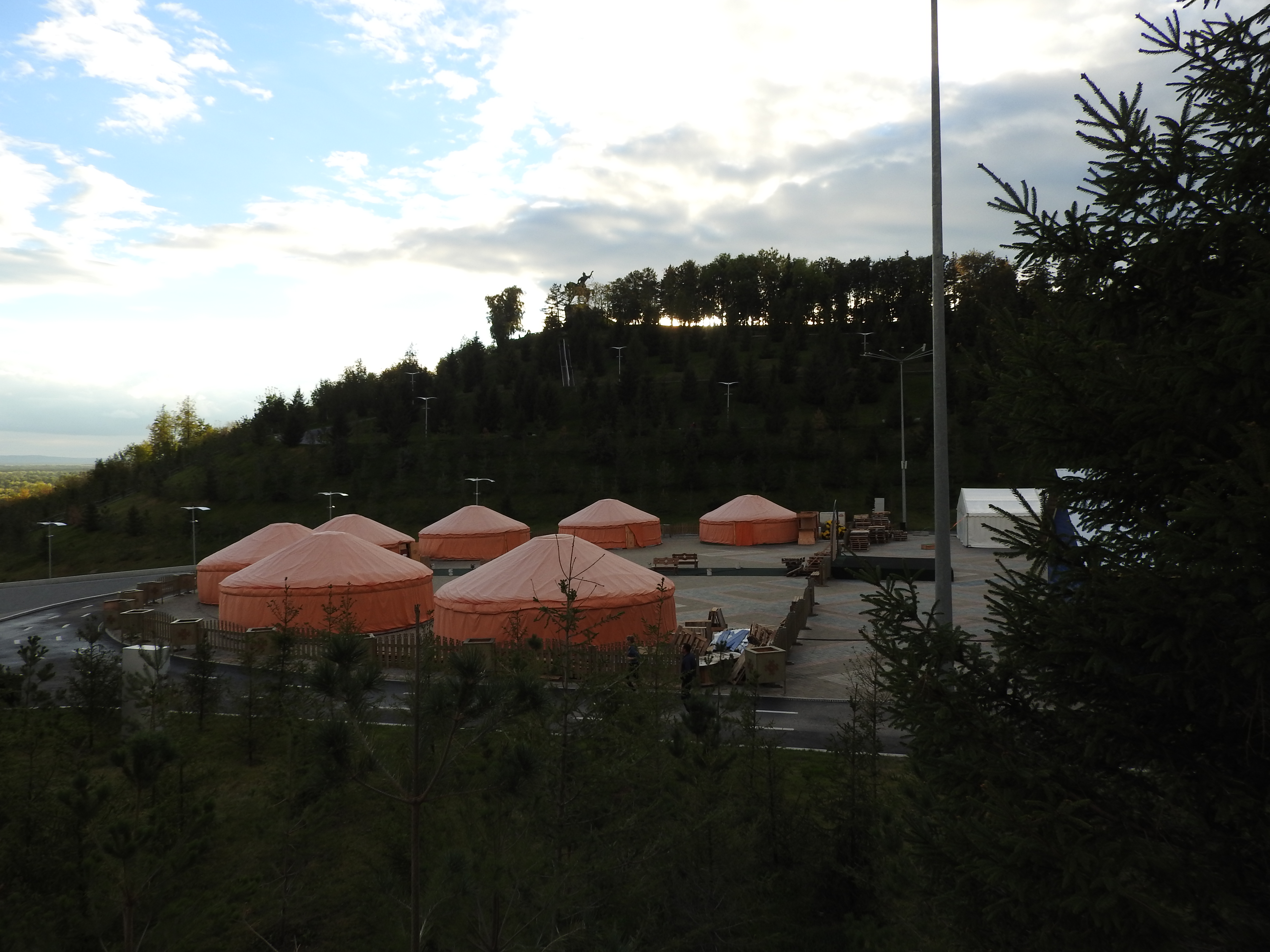 Этнопарк "Ватан", г. Уфа